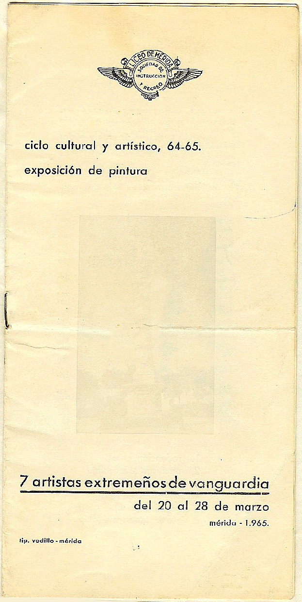 Catálogo de la exposición "7 artistas extremeños de vanguardia". Sala de exposiciones de la Sociedad de Instrucción y Recreo Liceo de Mérida. 20-28 de marzo de 1965. Tip. Vadillo.